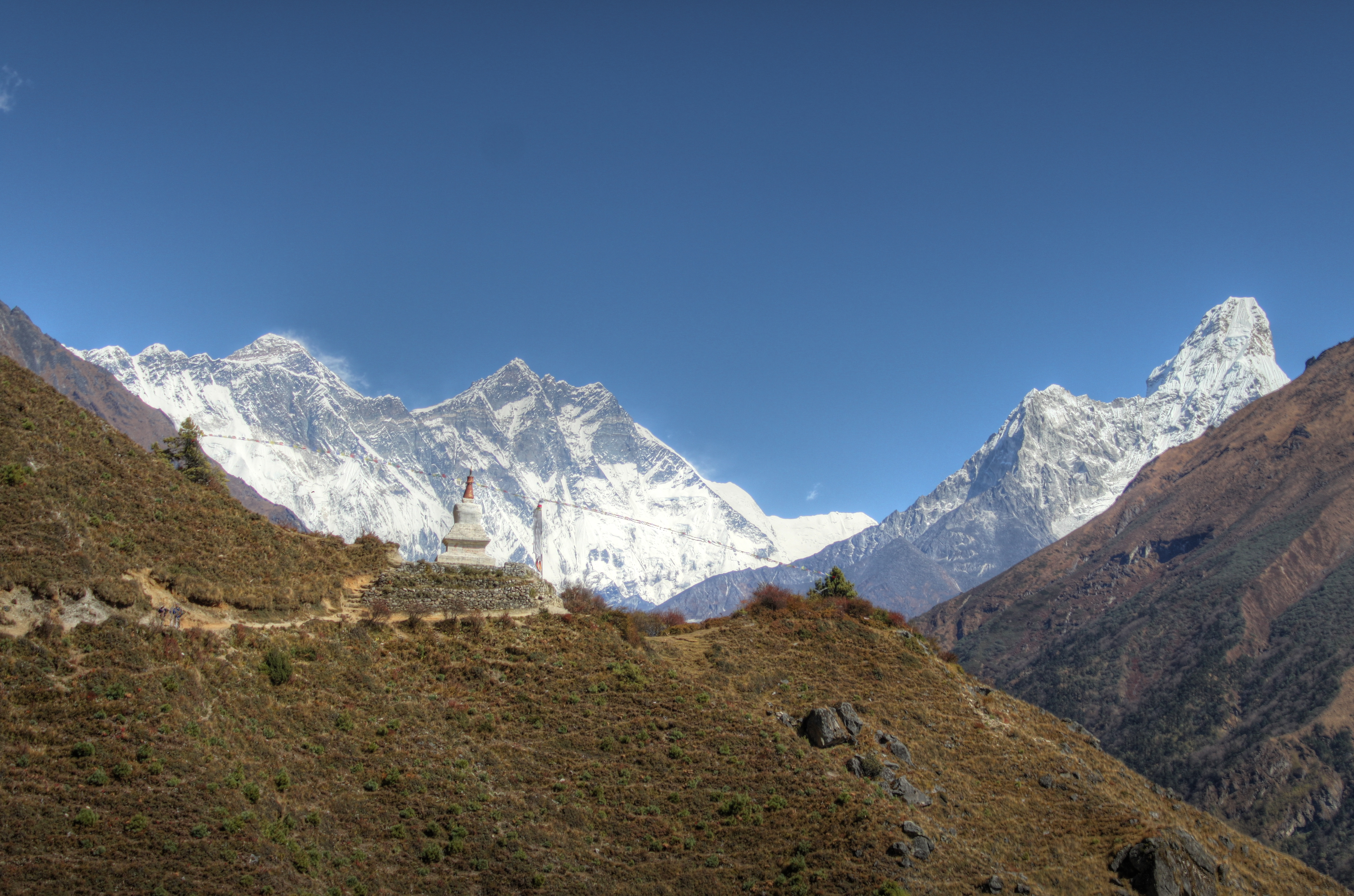 Mount Everest Trek, Nuptse, Mt. Everest, Lhotse, Ama Dablan